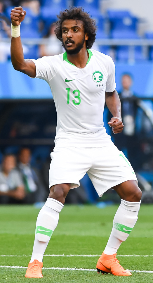 Гол Суареса на «Ростов Арене» вывел Уругвай в плей-офф чемпионата мира